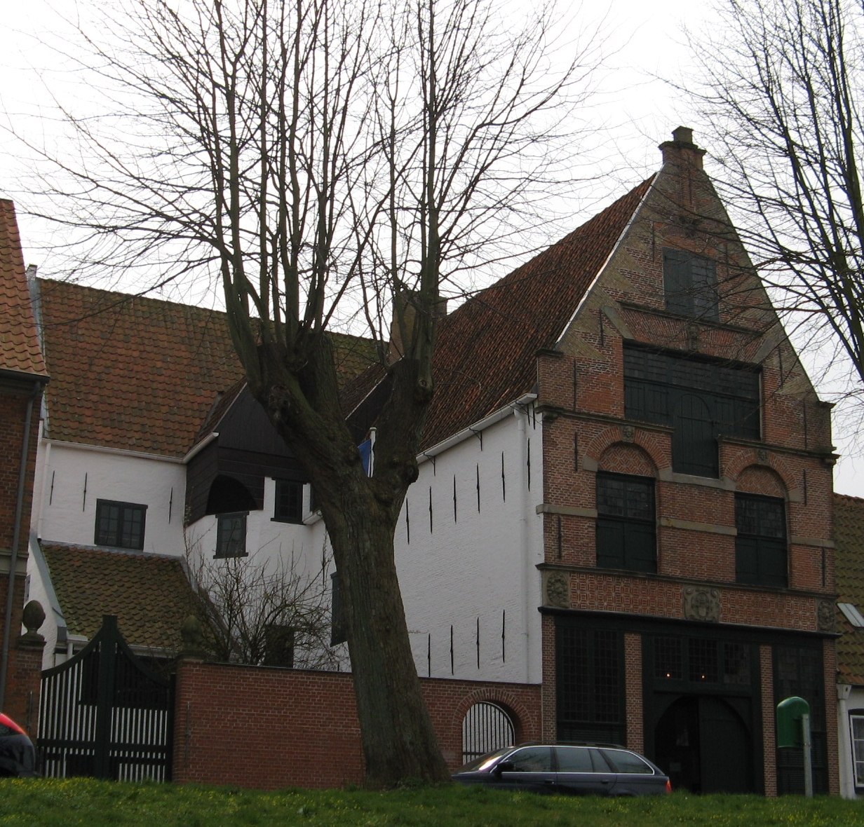 Alte Münze, Friedrichstadt Author: Dirk Ingo Franke